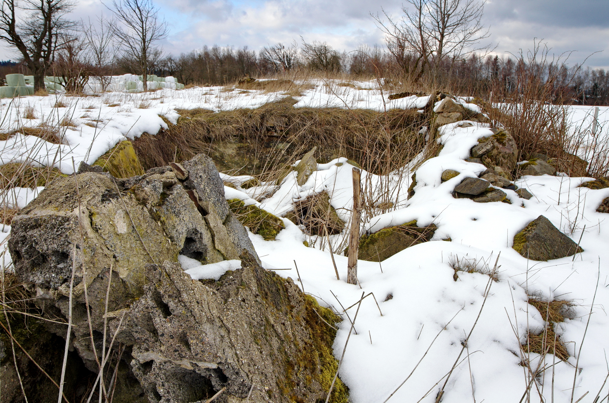 Čistá, zaniklé město ve Slavkovském lese, pozůstatek po vojenském výcvikovém prostoru - betonová pevnůstka, okres Sokolov